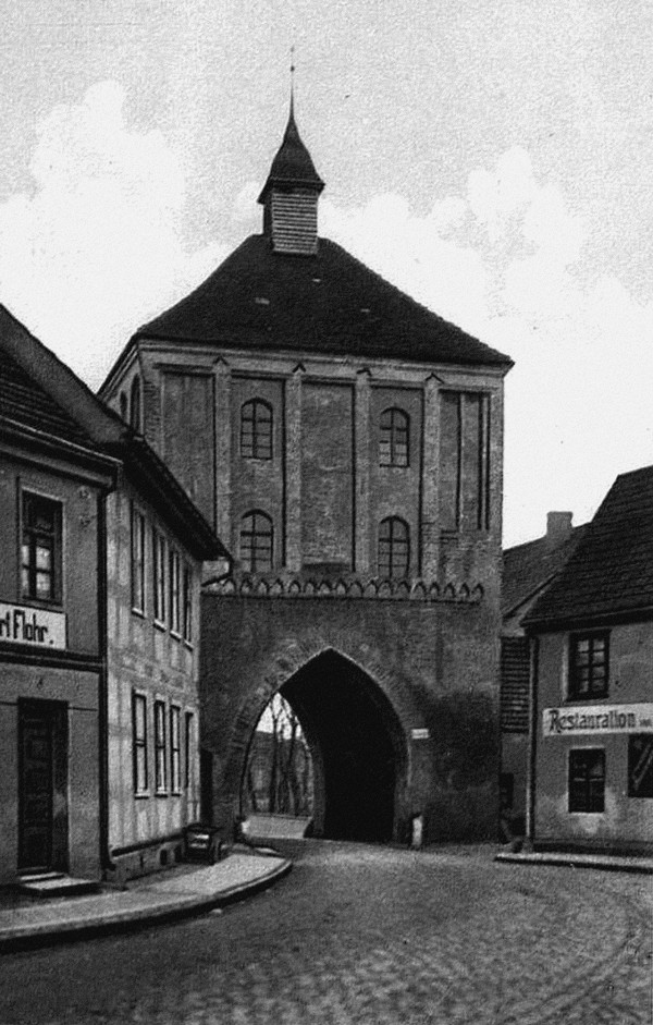 Brama Wysoka w Gryficach (Polska) - dawniej Greifenberg in Pommern